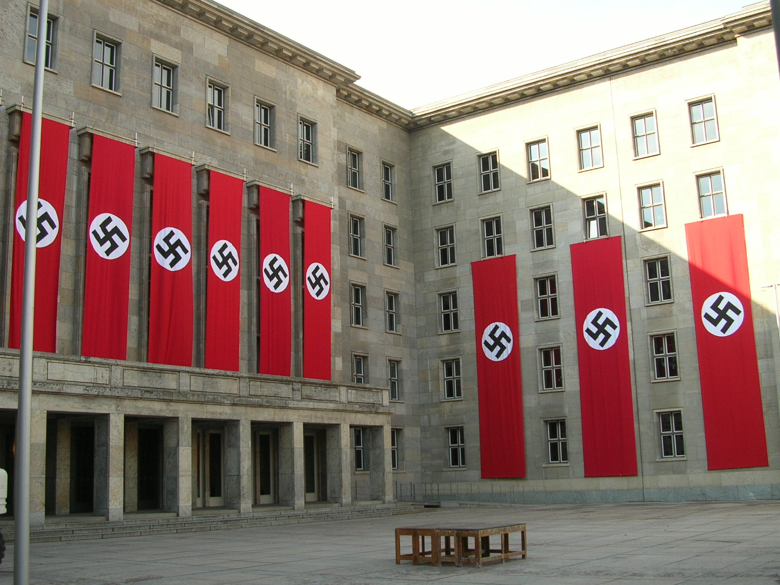 Beflaggung des Reichsluftfahrtministerium. Hier während Dreharbeiten als Filmkulisse zum Film "Mein Führer" am 05. März 2006 in Berlin (Prinz-Albrecht-Straße, Ecke Leipziger Straße).